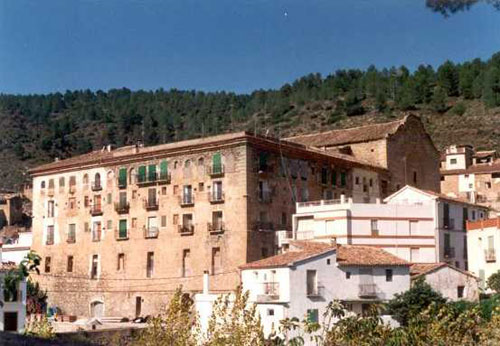 Vista frotal del convento